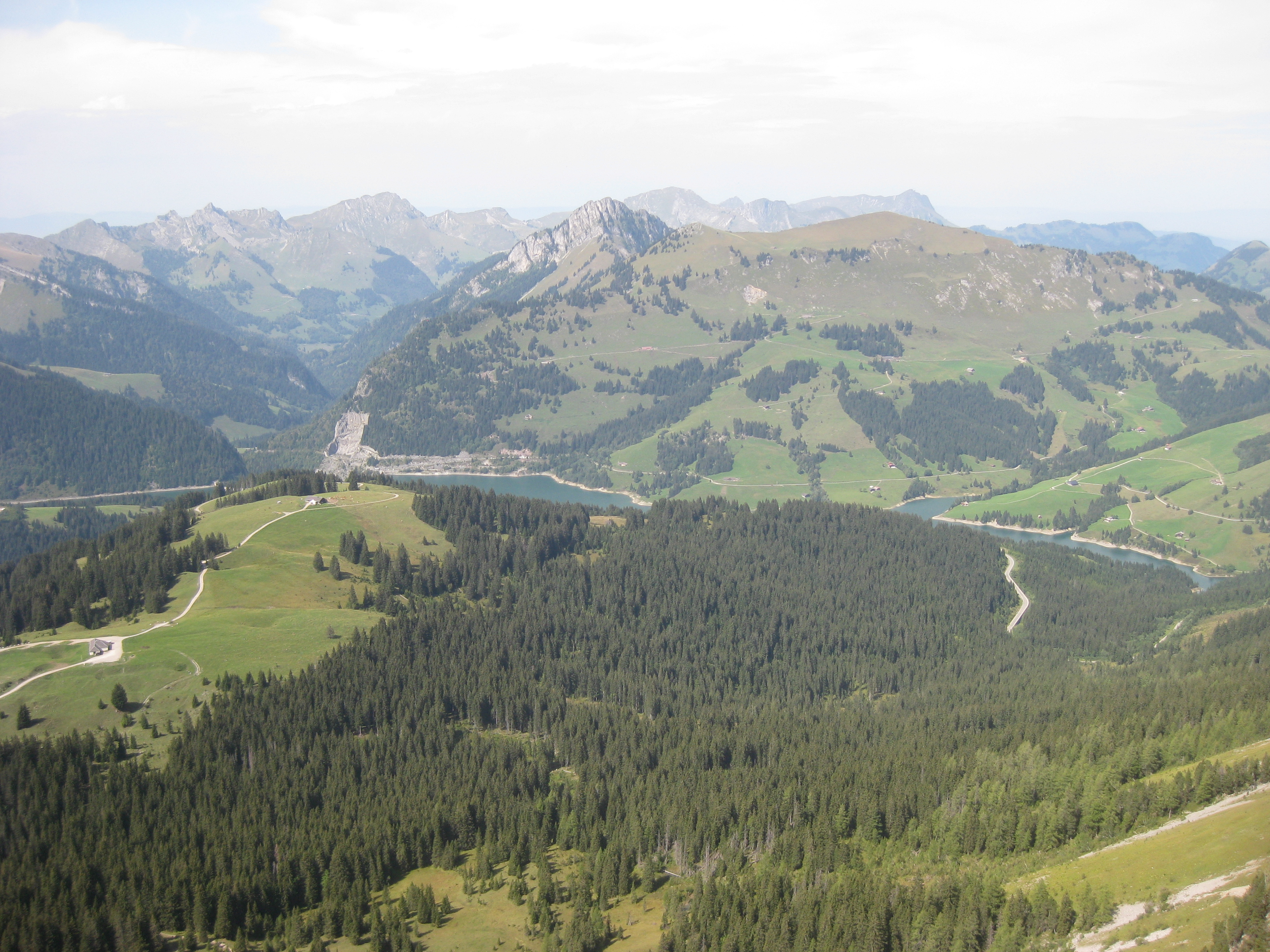 Le Lac de l'Hongrin vu du sud-est.